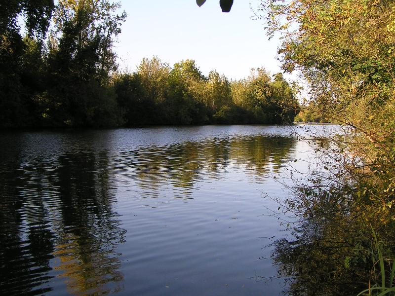 Fleuve Charente en amont de Cognac